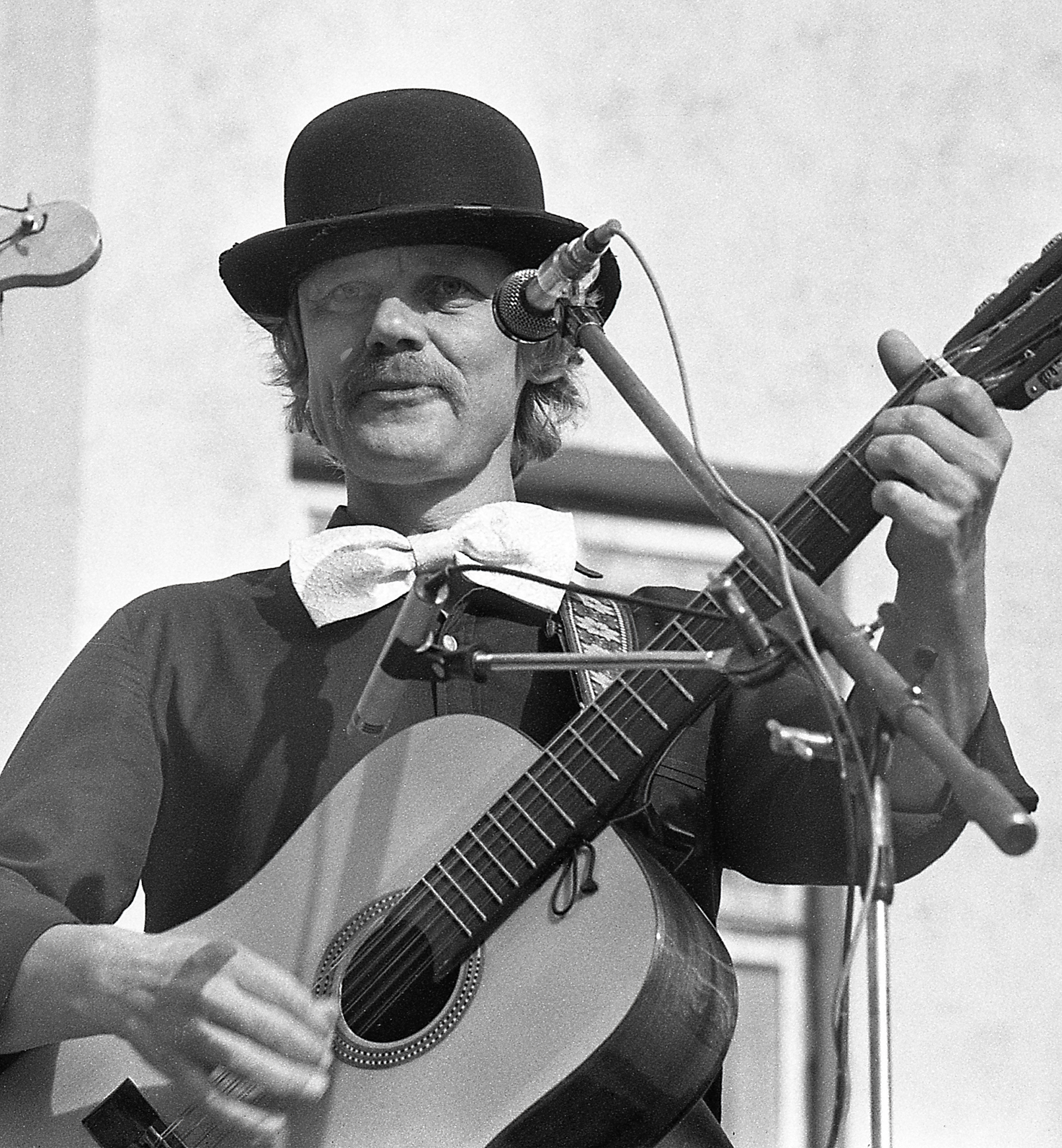 Kaarel Kilvet esinemas ansambli Hampelmann koosseisus.